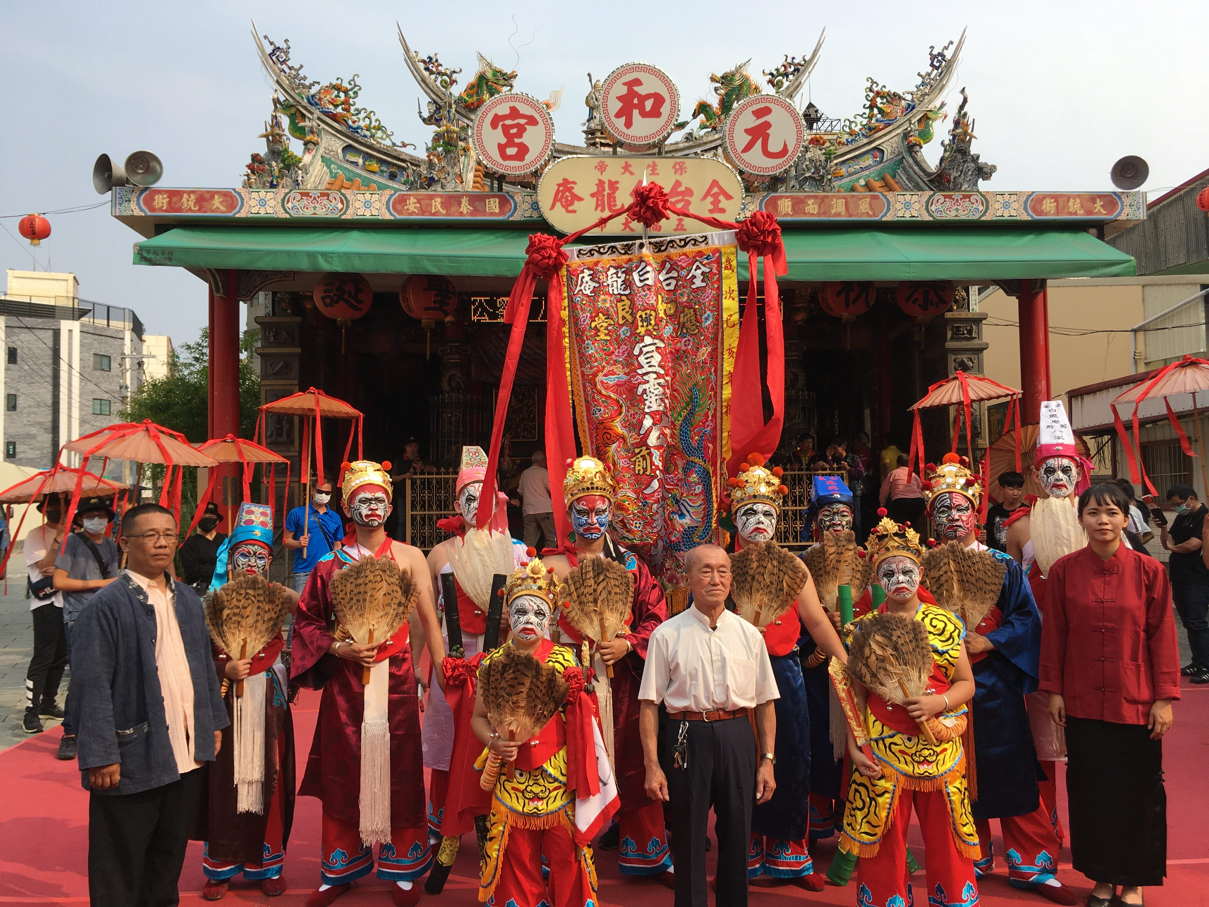 全臺白龍庵如良應興堂宣靈公駕前八家將為主公祝壽後，留下的合照